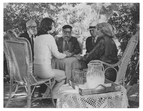 Escena de película en un exterior, de izquierda a derecha los actores: Bárbara Mujíca, Mario Soffici, Narciso Ibáñez Menta, Arturo García Buhr y Mecha Ortíz.